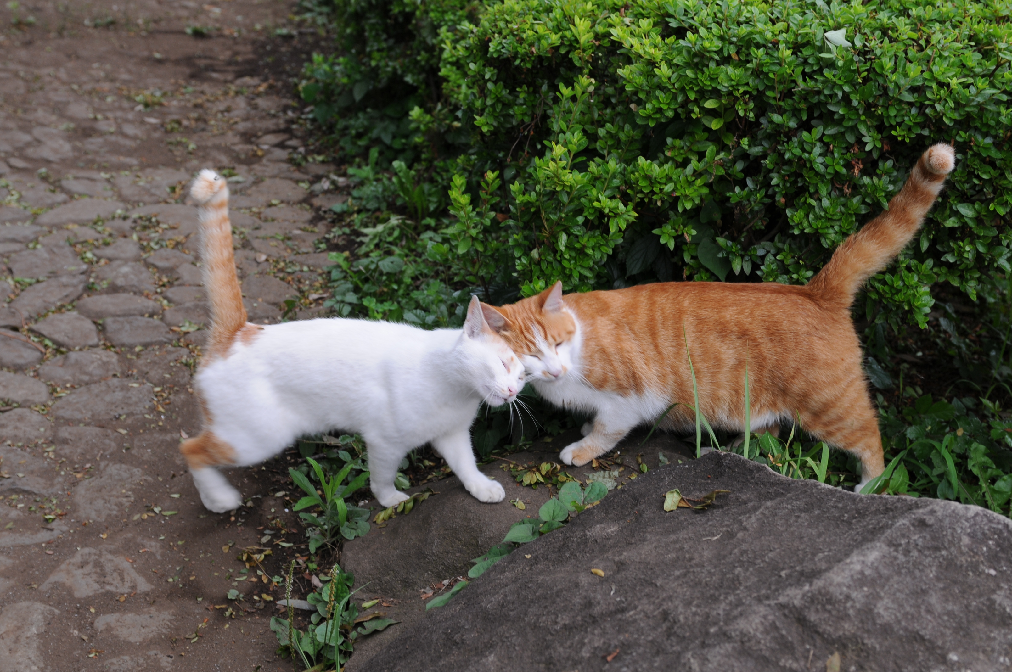 D02_0005